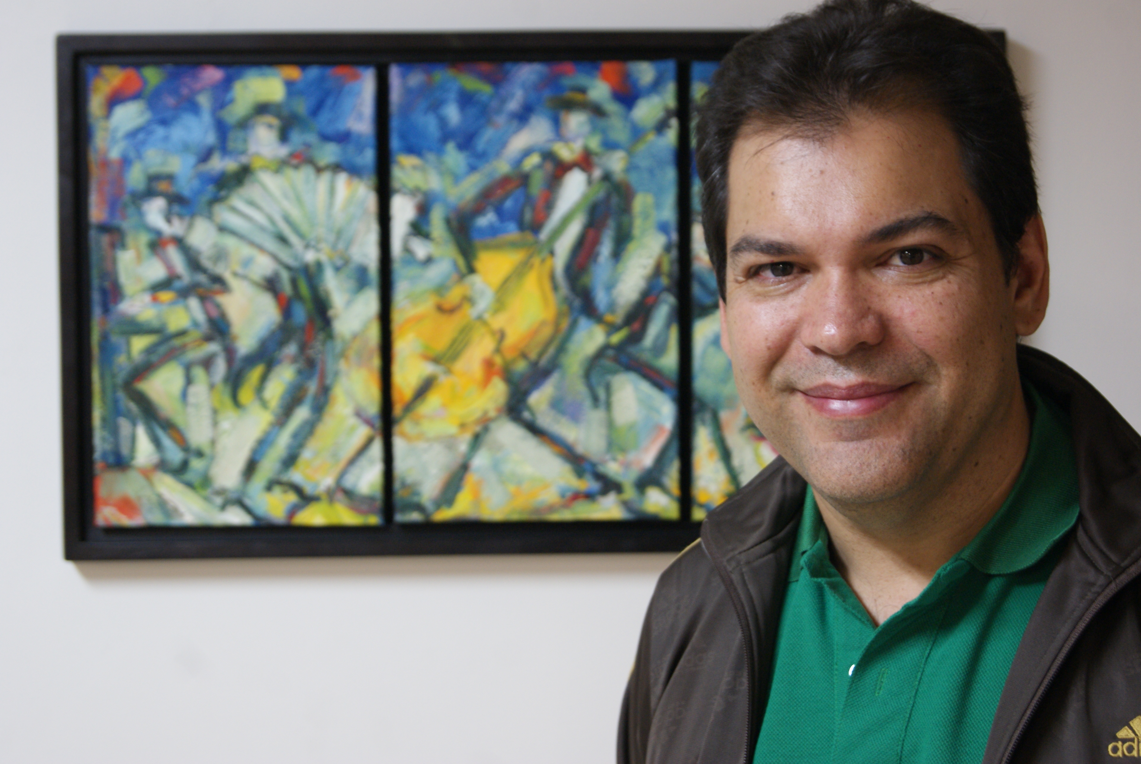 Maestro José Javier Mejia Palacio